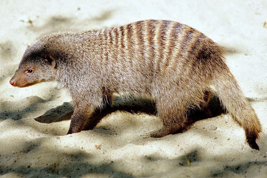 Zebramanguste (seitliche Ansicht)